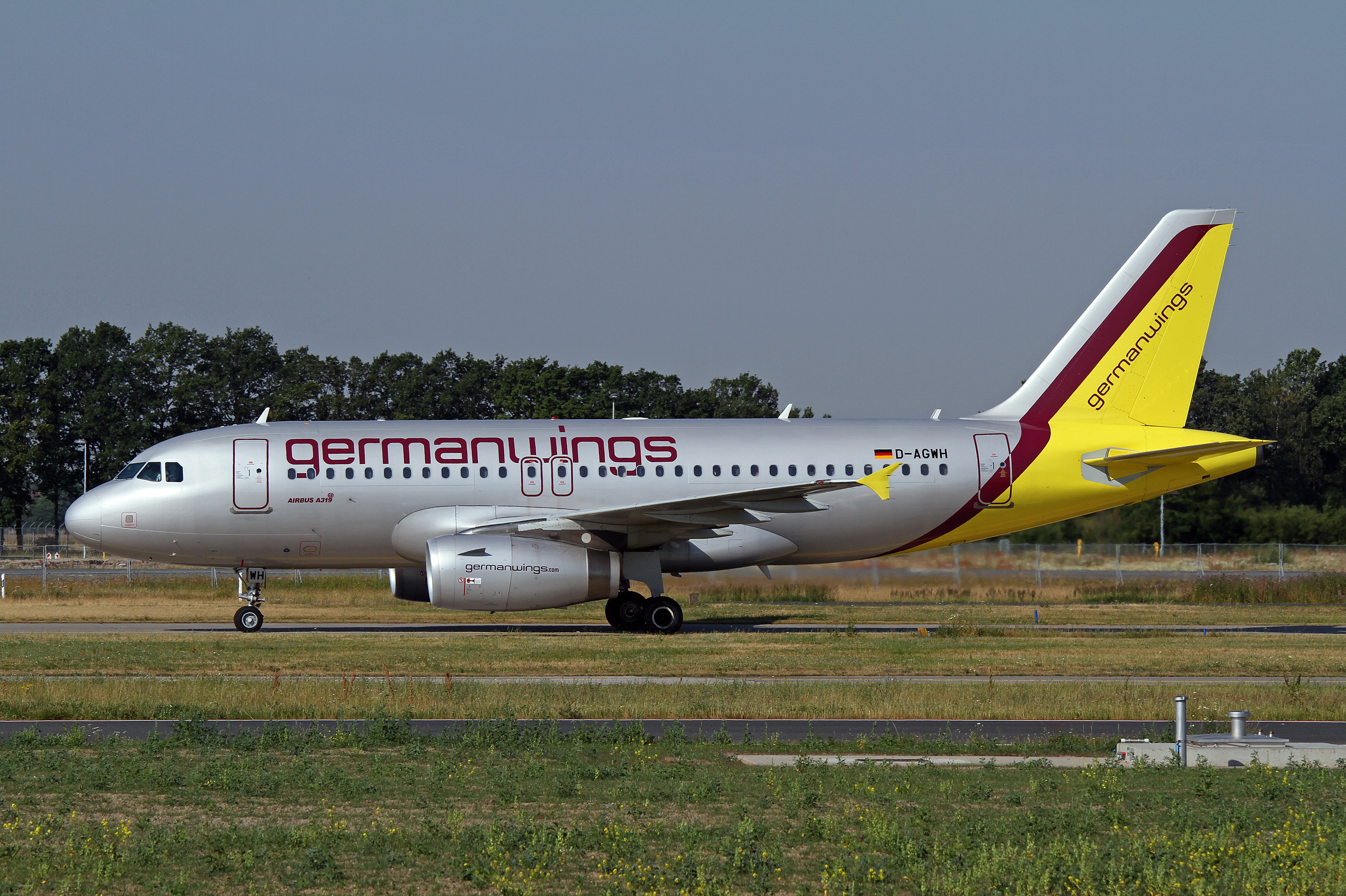 D-AGWH